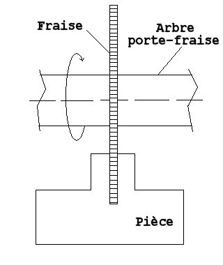 dessin personnel d'une fraise scie.